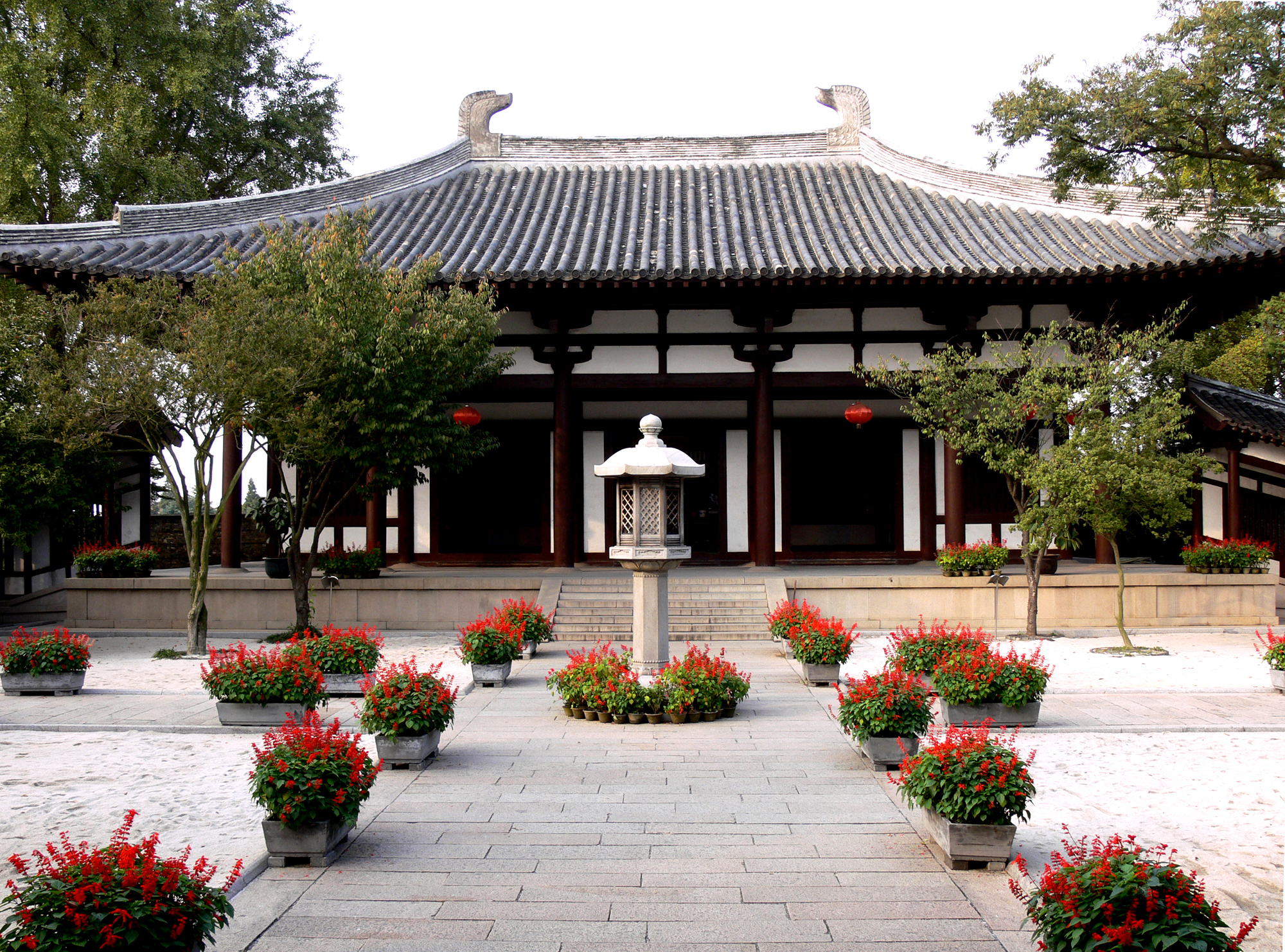 Monk Ganjin memorial Hall, Yangzhou 扬州大明寺鉴真和尚纪念堂